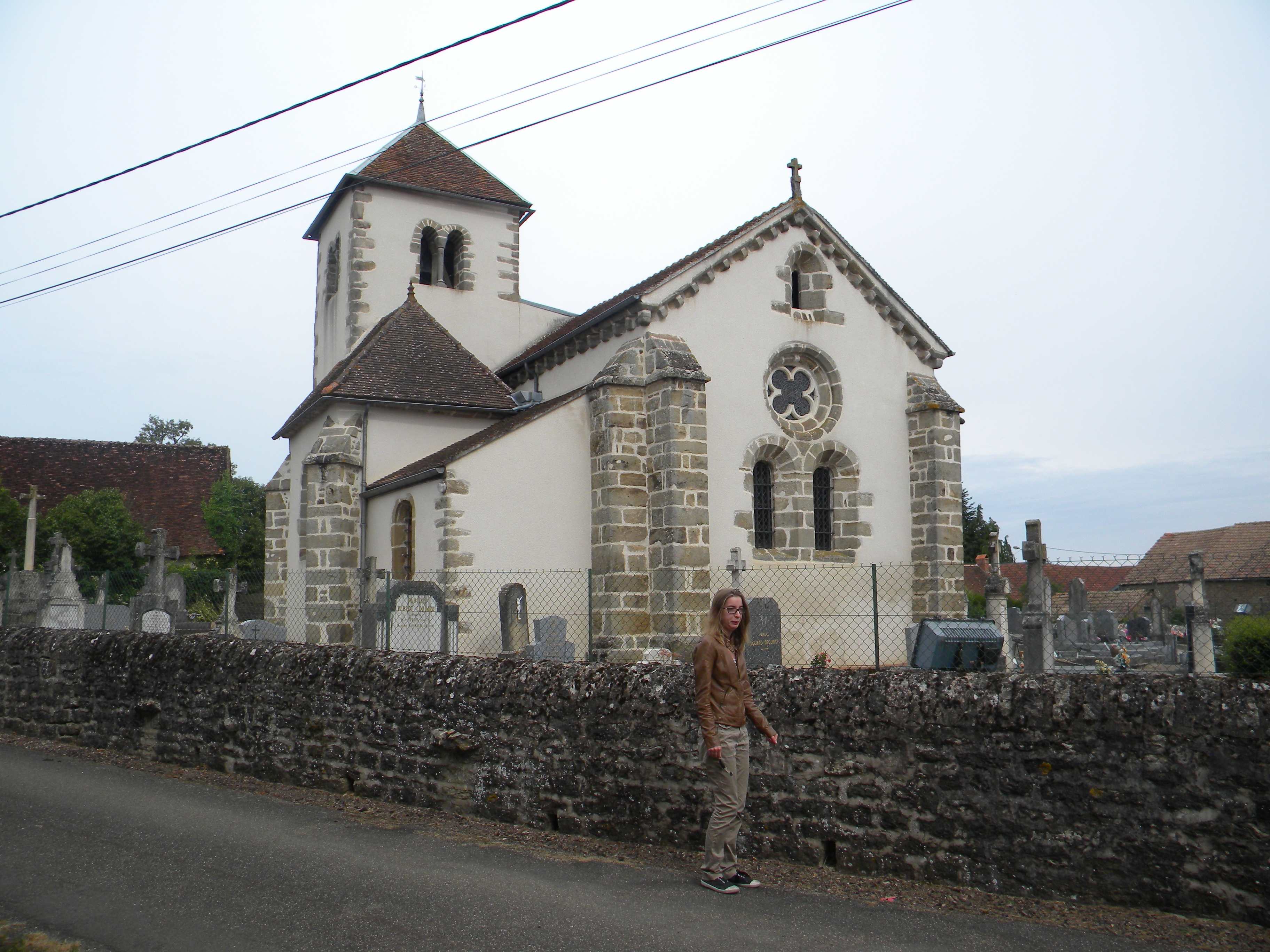 La preĝejo de Saint-Prix-lès-Arnay